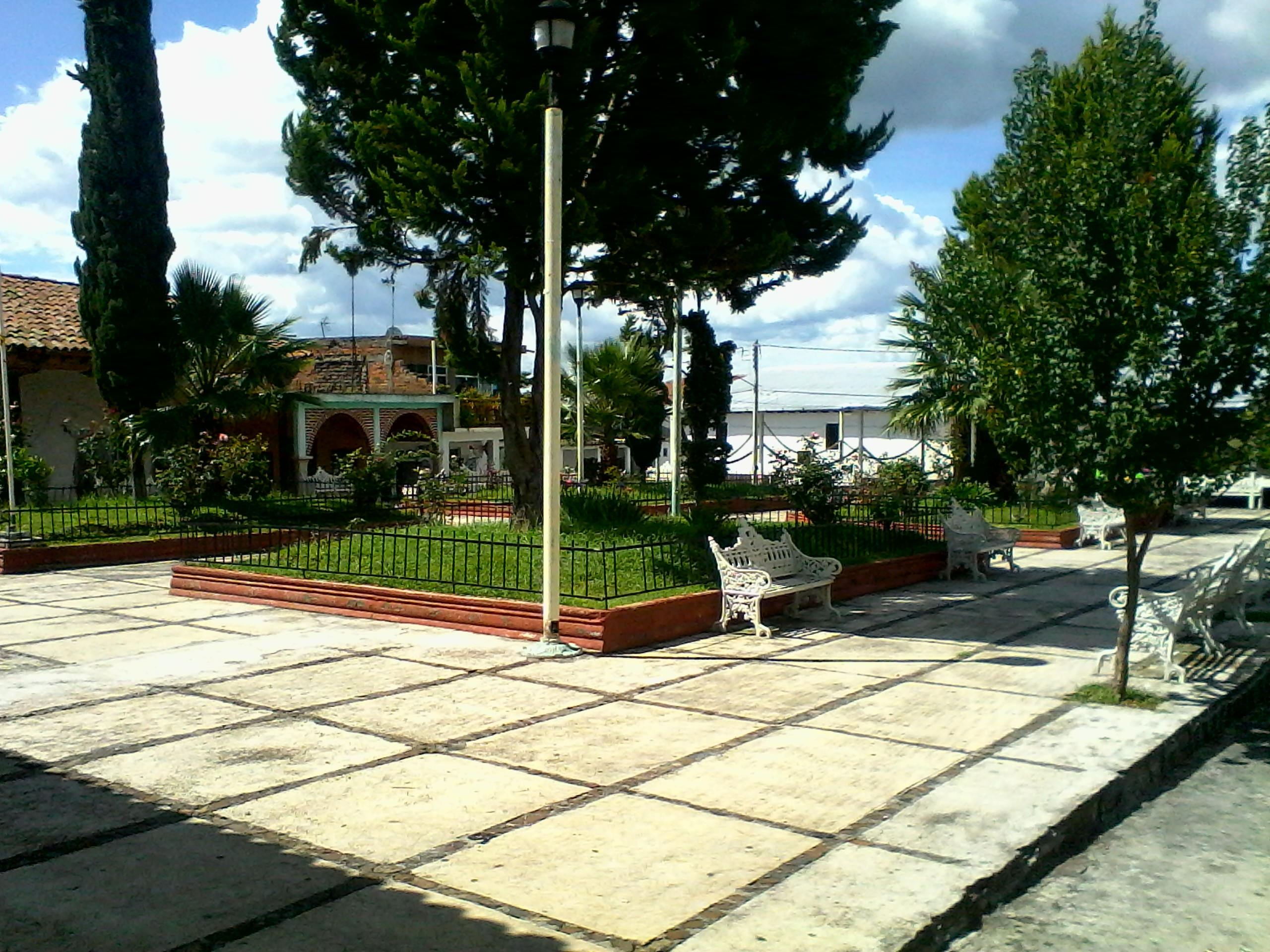 Plaza principal de la comunidad de Tarejeero